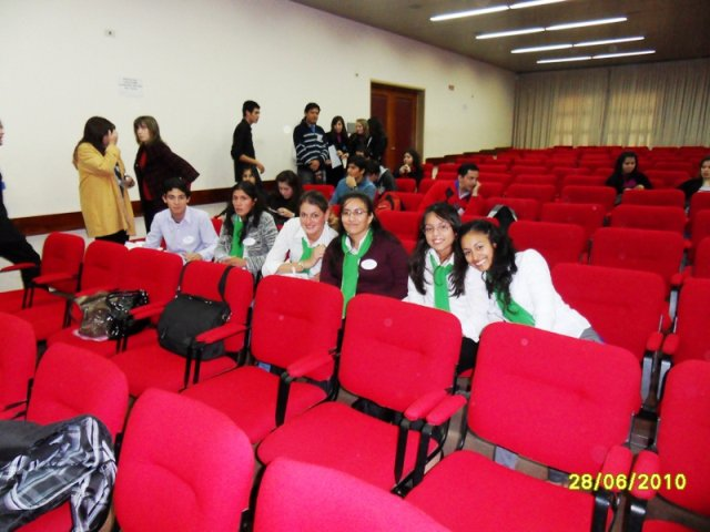 Grupo de Alumnos exponiendo en el salon auditorio de la Facultad de Ciencias Económicas de la UNNE